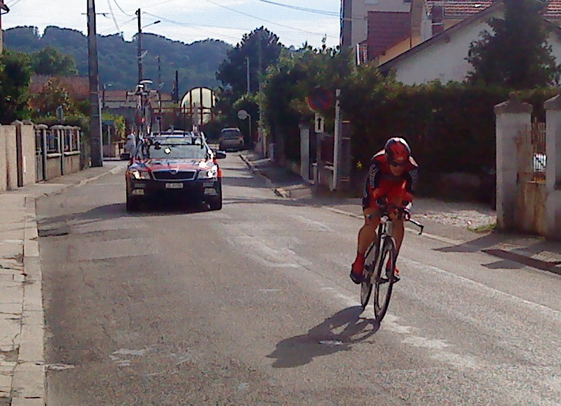 Chris Barton lors du prologue du Tour de l'Ain 2010